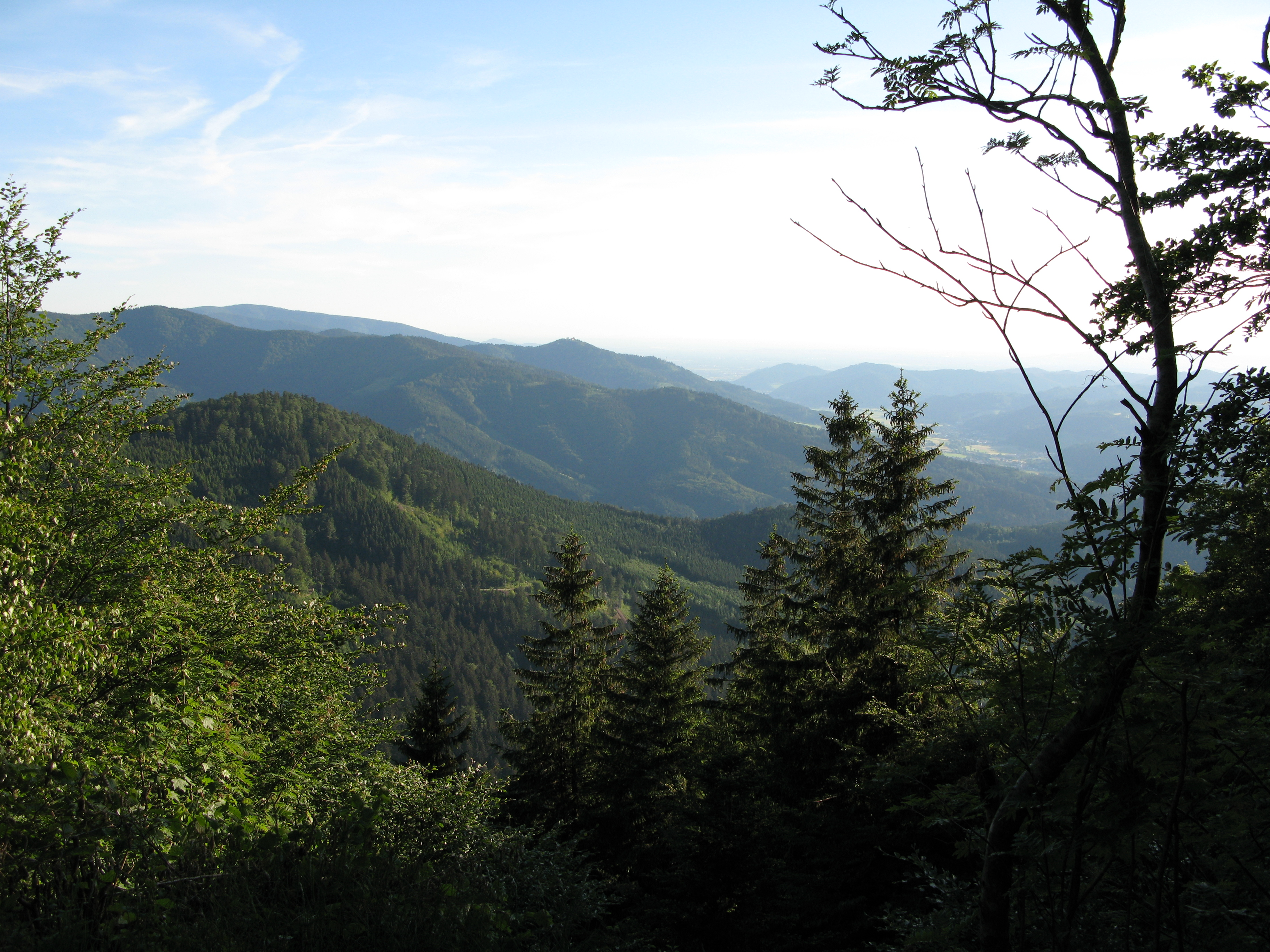 Blick vom Gschasifelsen in das Elztal und der Kapelle auf dem Hörnleberg am Zweitälersteig im Schwarzwald